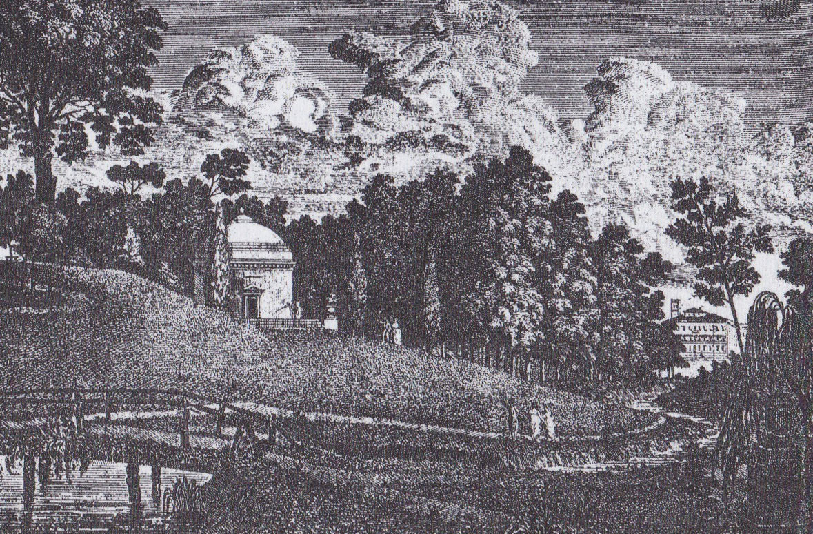 Vista del parco di Villa Ghirlanda Silva, col tempietto alla Fortuna Avita in primo piano, a Cinisello.